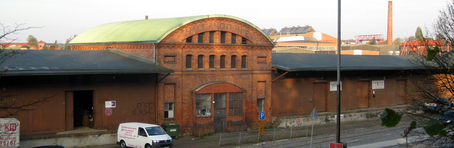 Schuppen 10/11 in Lübeck, hier Schuppen 11, Teil des unter Denkmalschutz stehenden Ensembles an der Hafenstraße, Blick von der Fährstraße